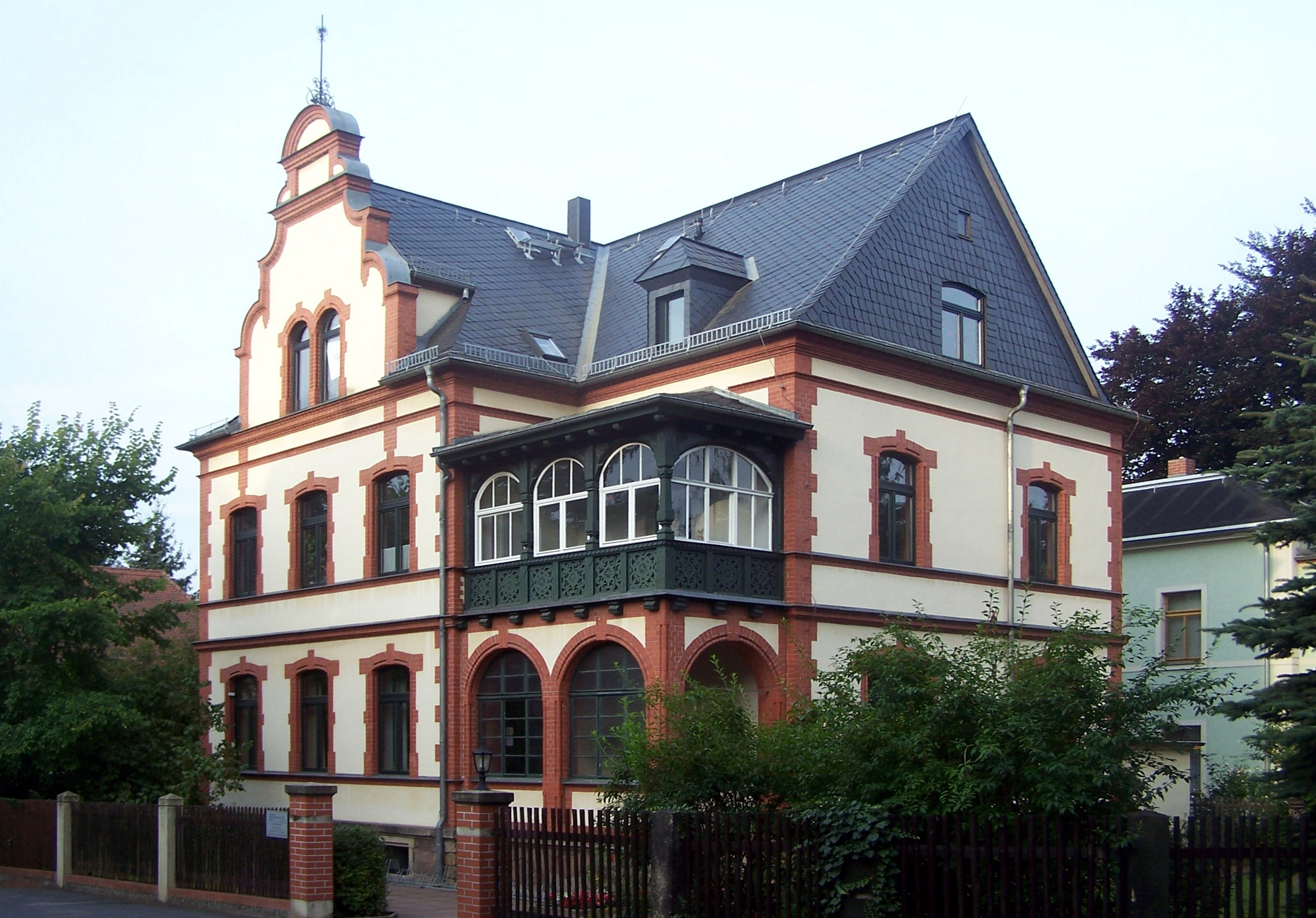 Pfarrhaus der Lutherkirche in Radebeul